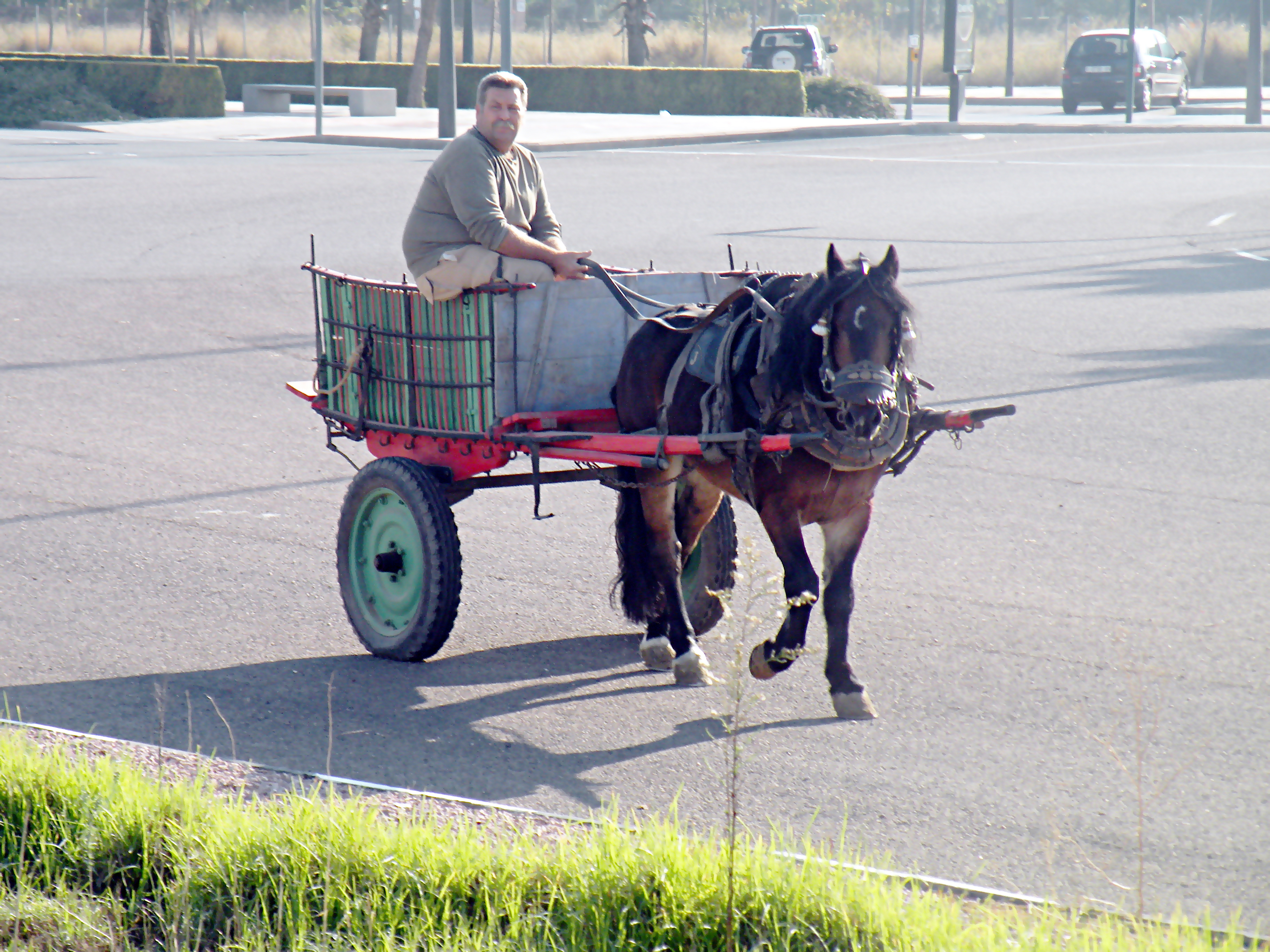 Vehicle (Valencia).